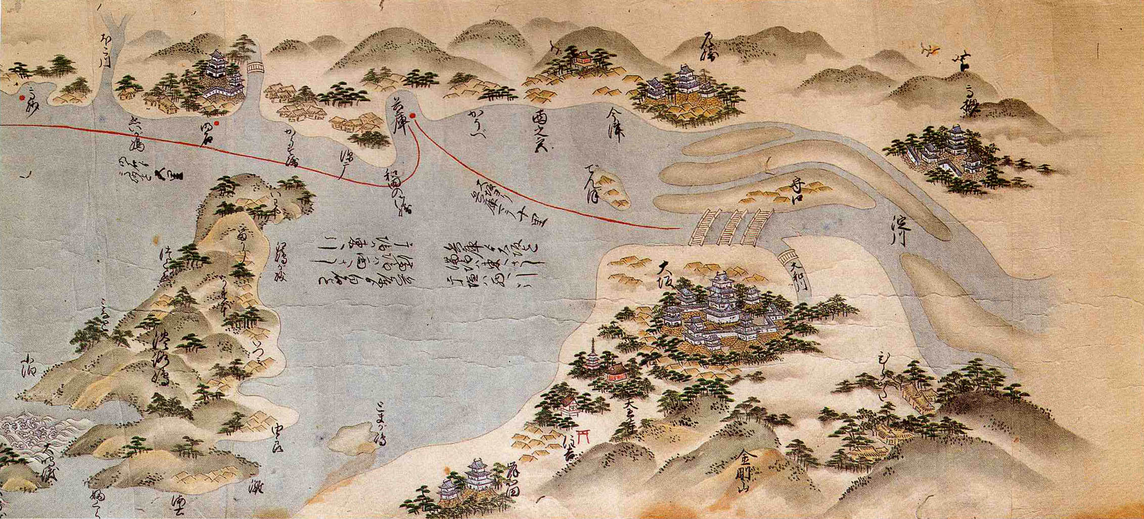 大坂から松江まで航路図